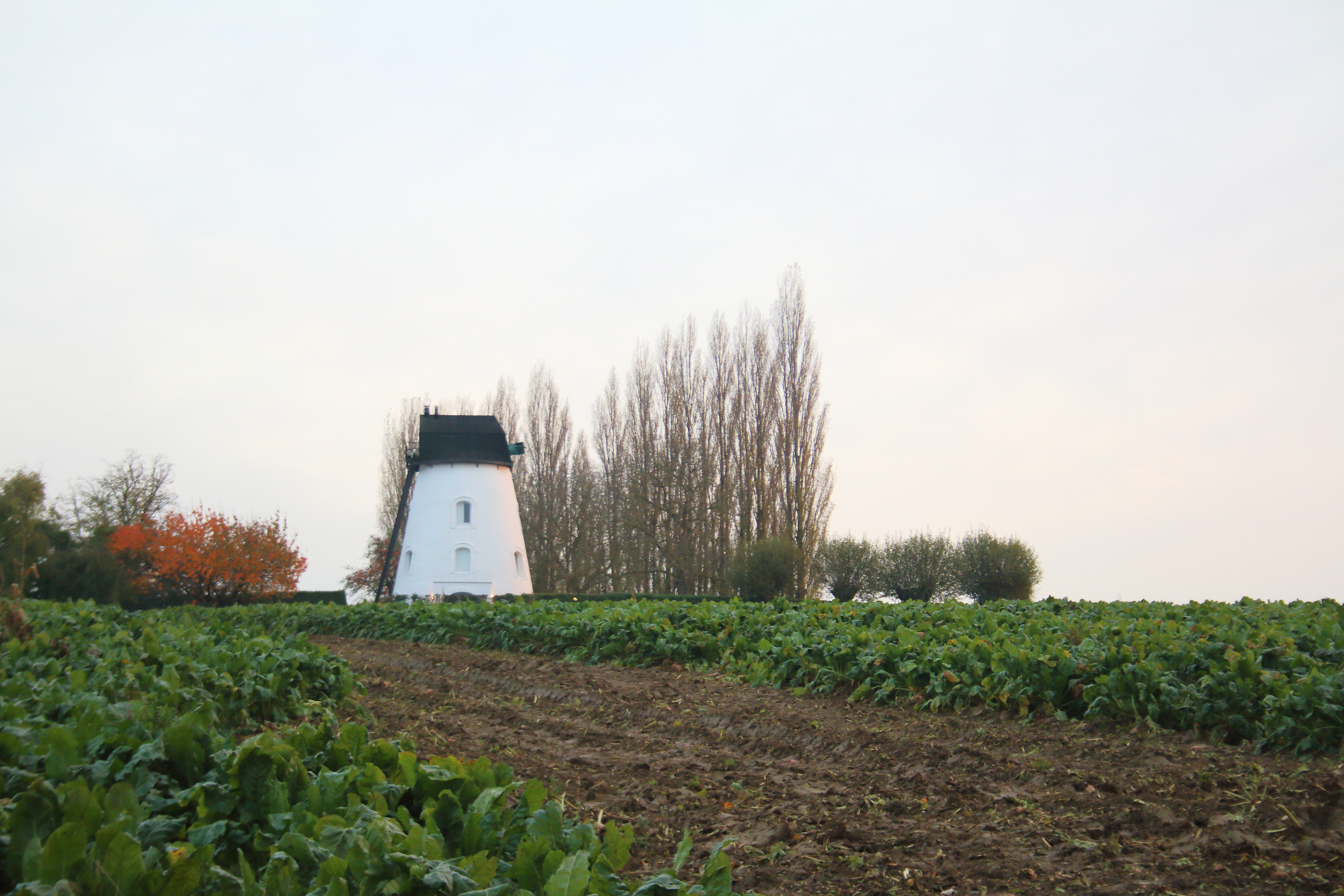 Koutermolen, Rozebeke, Zwalm, Vlaanderen, België